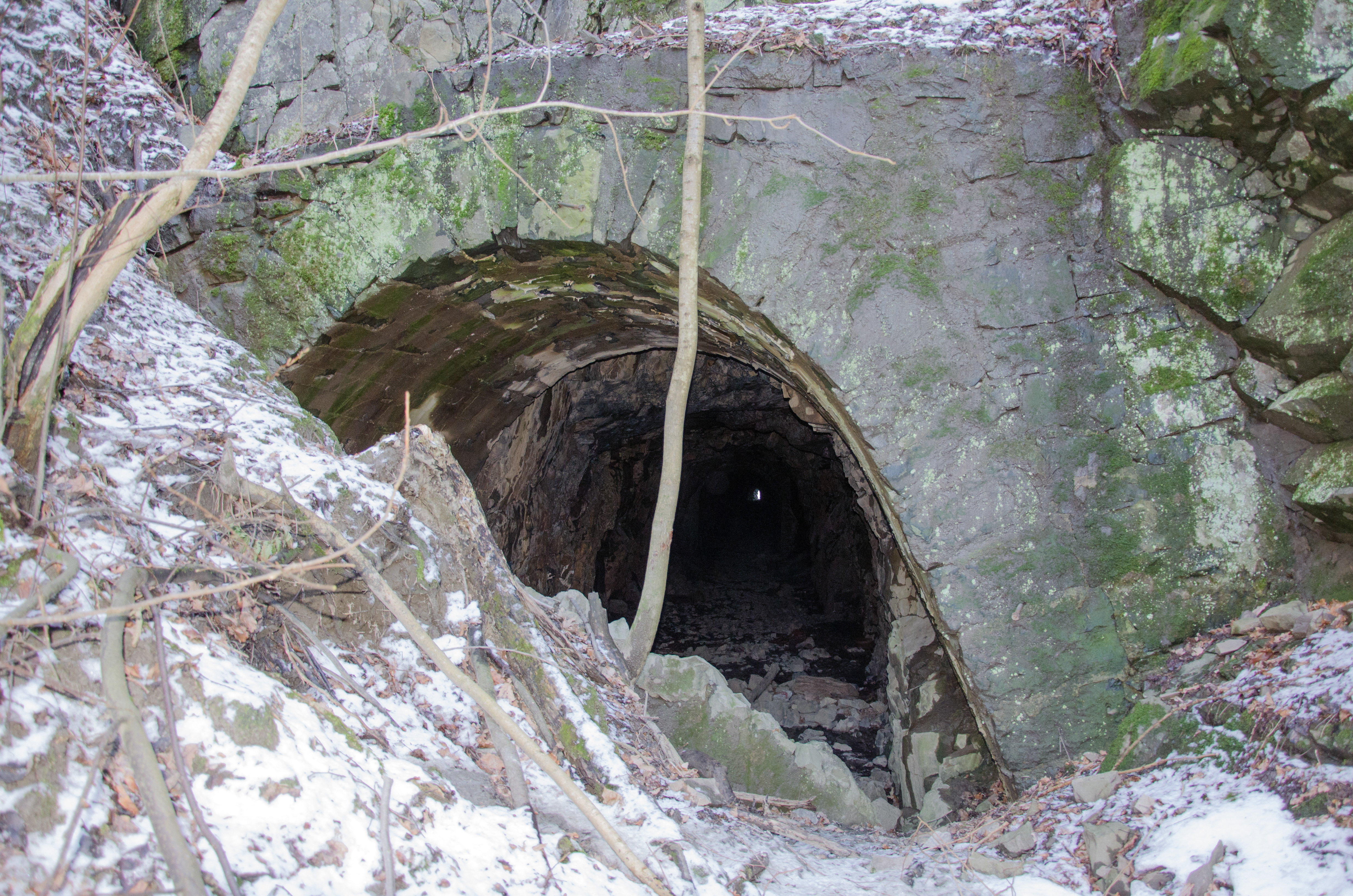 Gausen tunnel - Innlofjellet tunnel